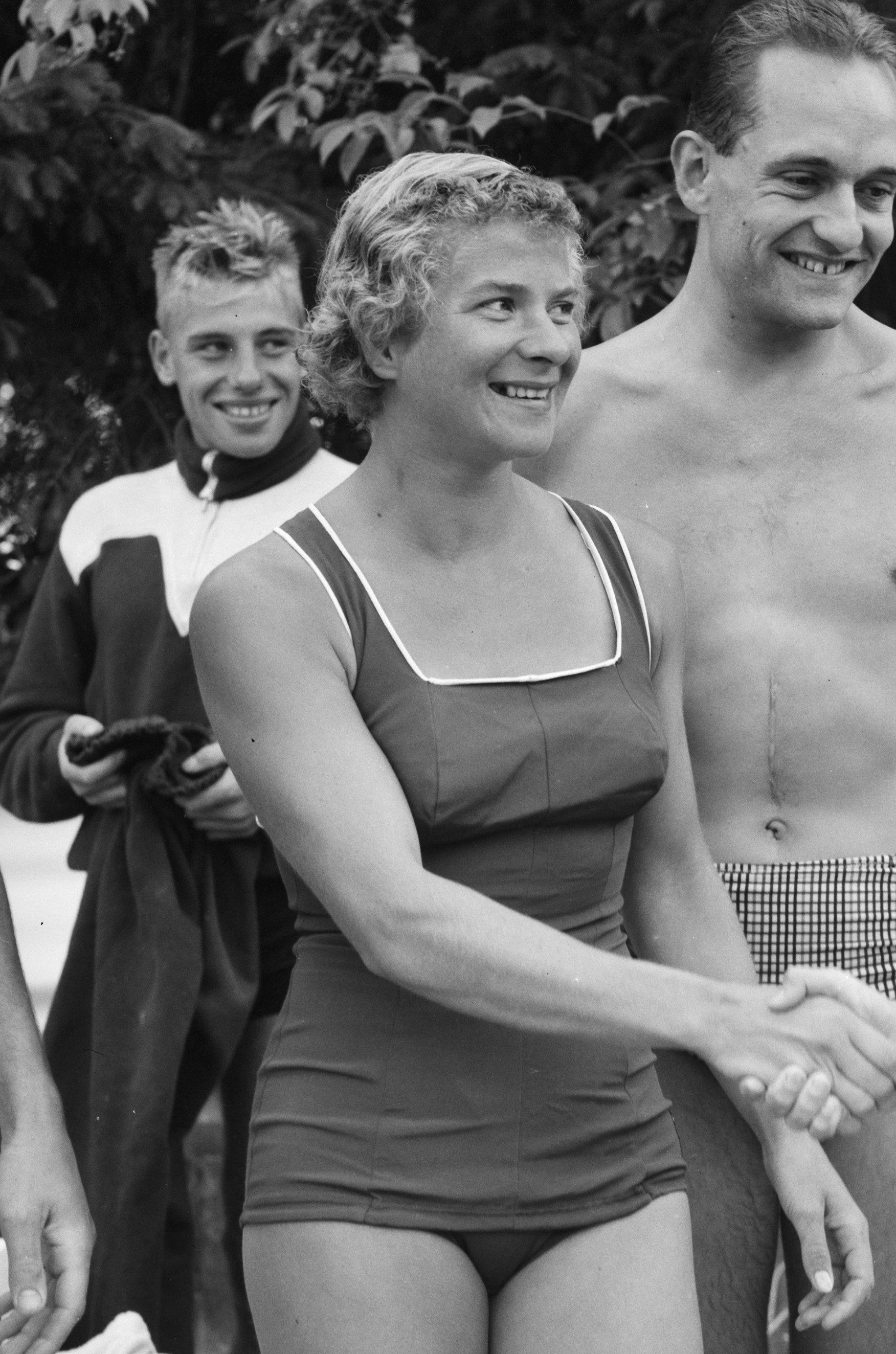 Nederlandse zwemkampioenschappen te Appelscha, Greetje Lugthart , winnares dames schoonspringen feliciteert winnaar heren Gerritsen.